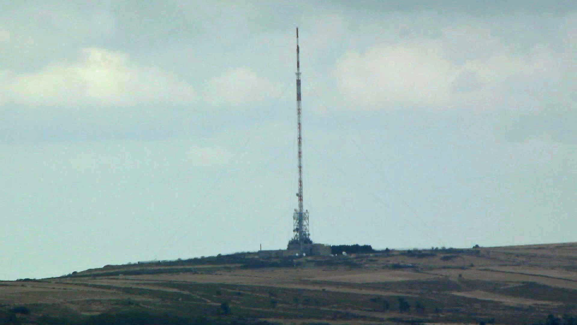 Émetteur de Roc'h Trédudon en 2010